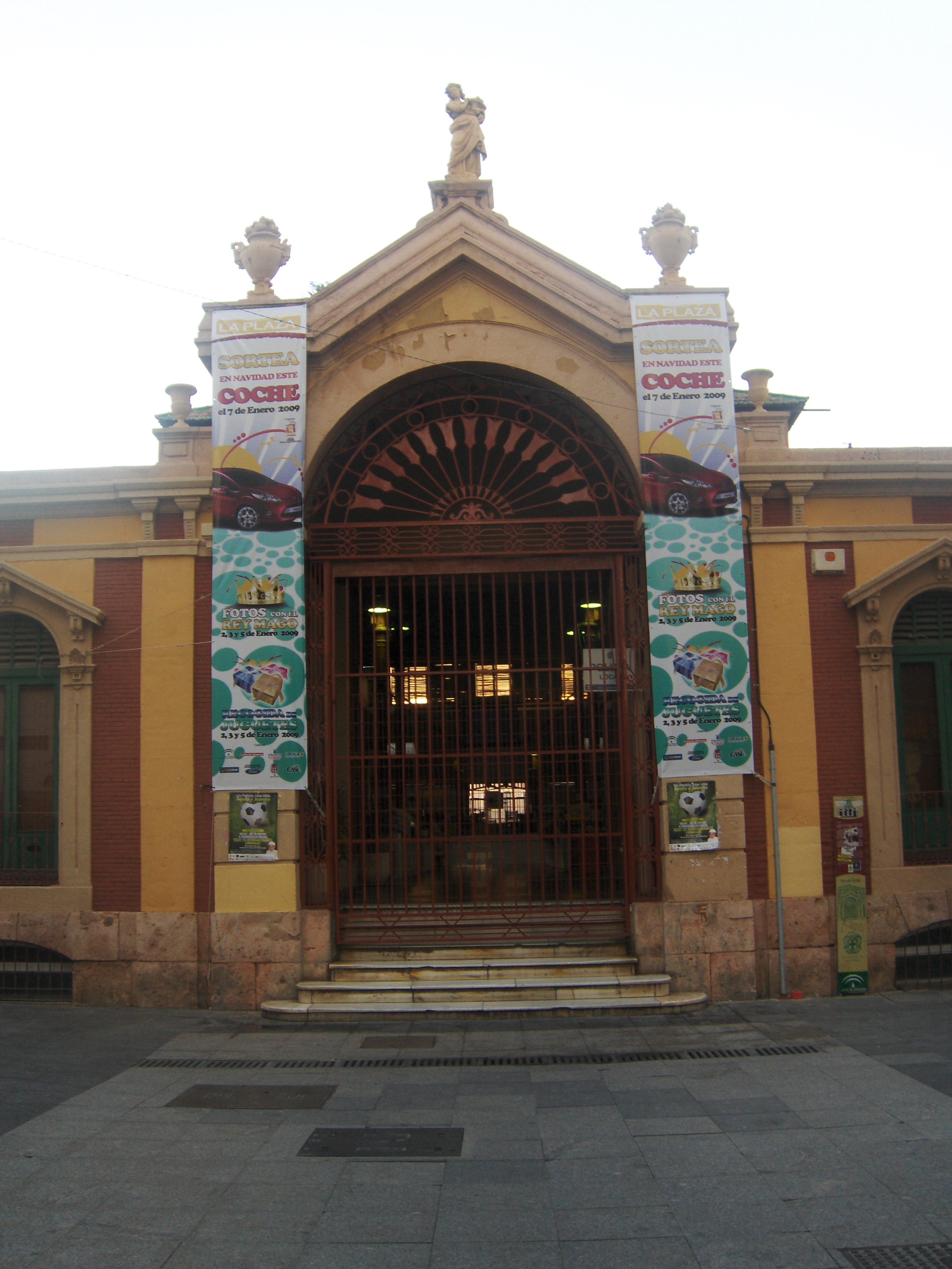 Mercado Central de Almería